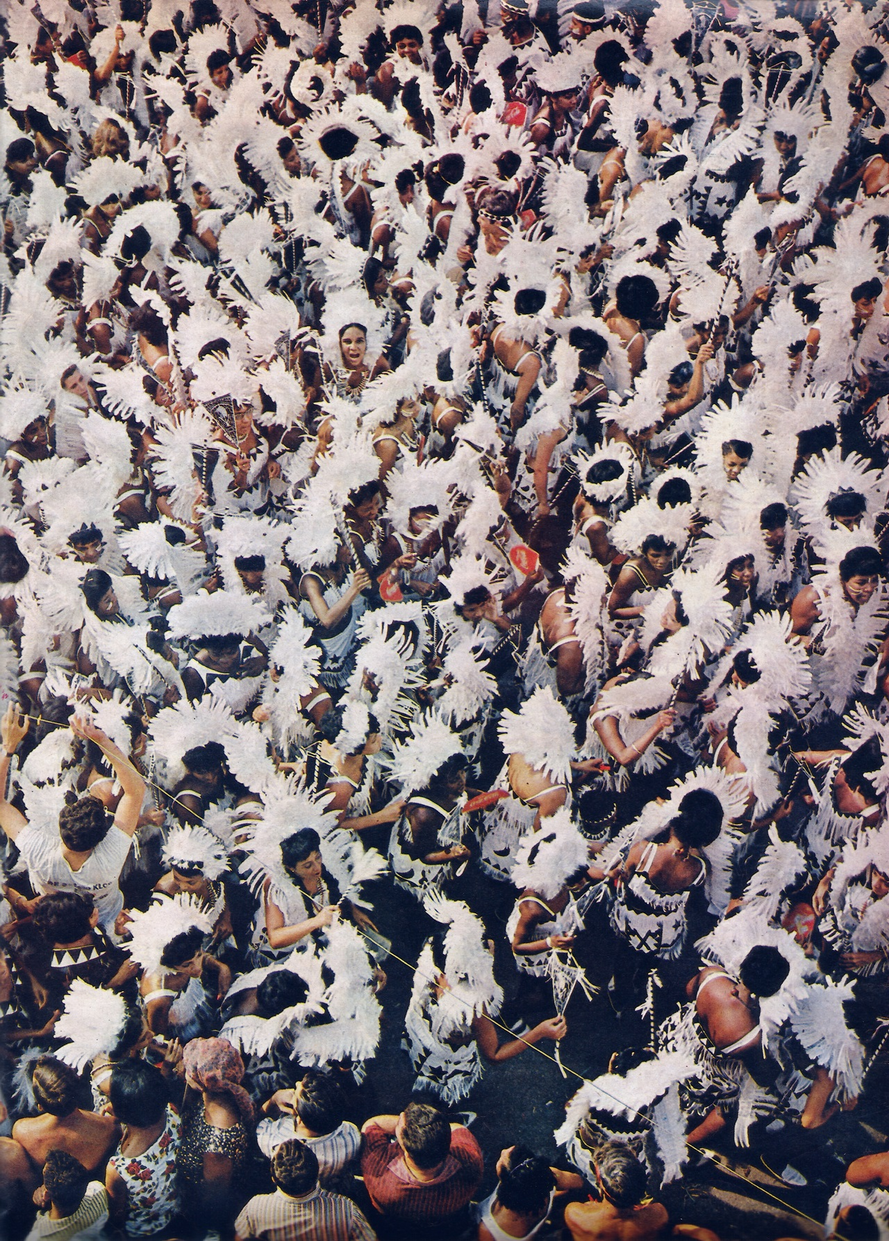 Bloco Cacique de Ramos, Carnaval do Rio de Janeiro, 1966 (photo Geraldo Viola)